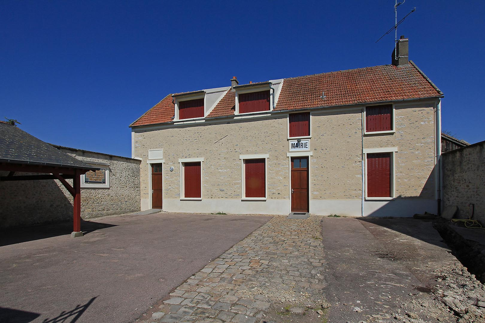 Mairie de Blandy